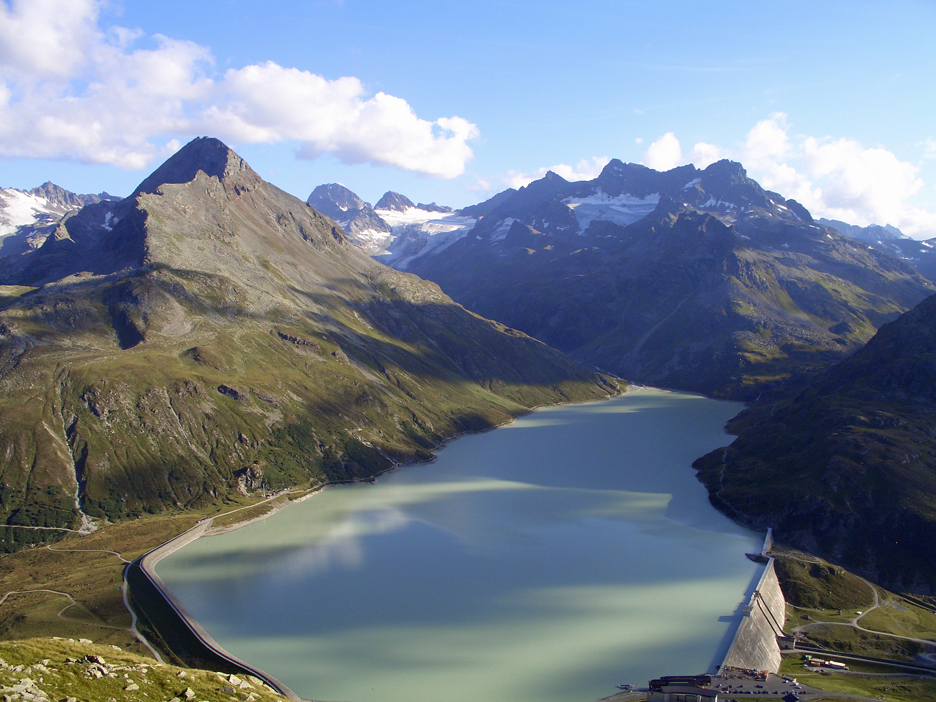 Silvretta-Stausee,Hohes Rad (links)und grosser und kleiner Piz Buin, davor der Ochsentaler Gletscher